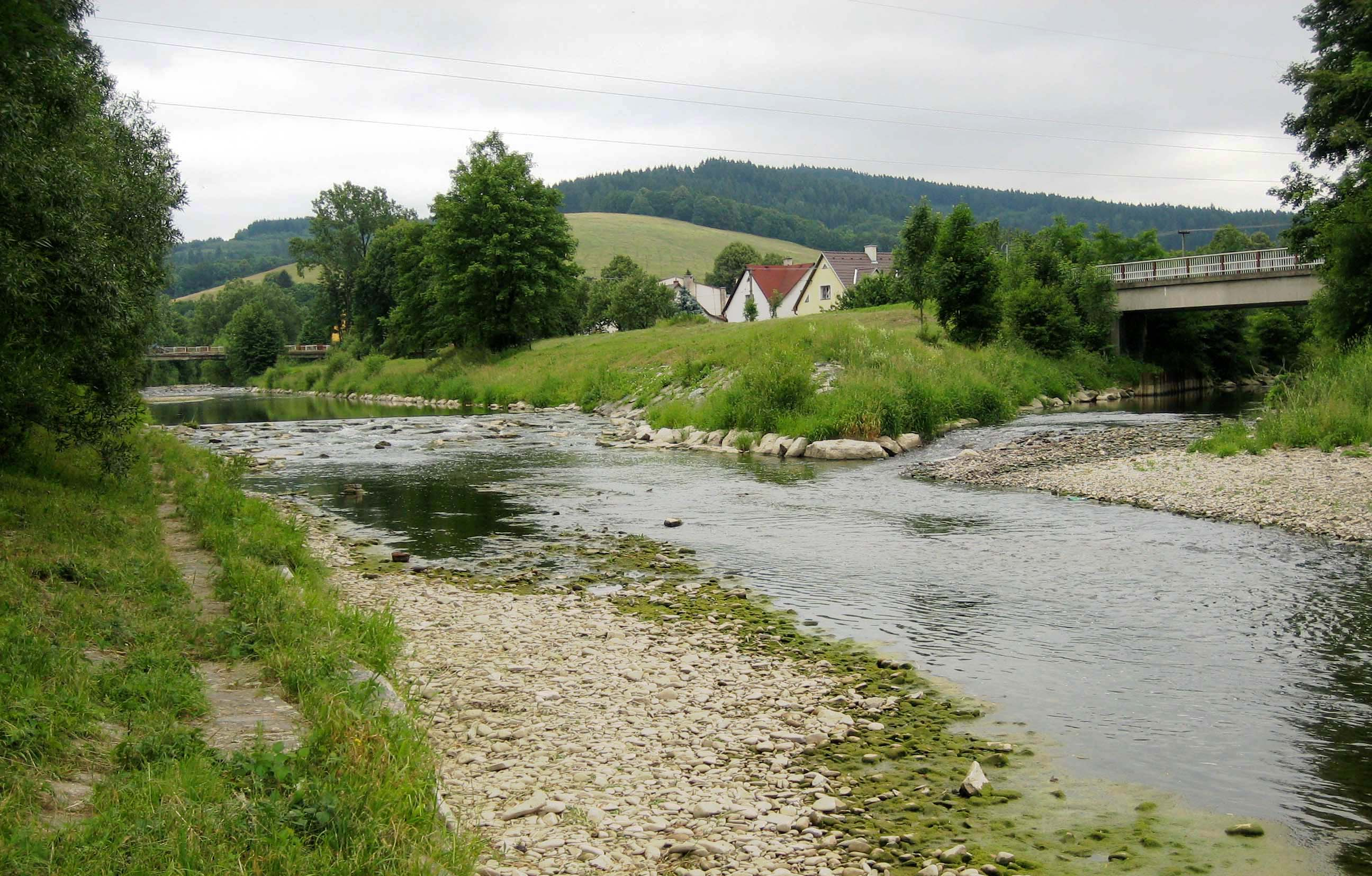 Vsetínská Bečva pod soutokem s říčkou Senicí v obci Ústí u Vsetína